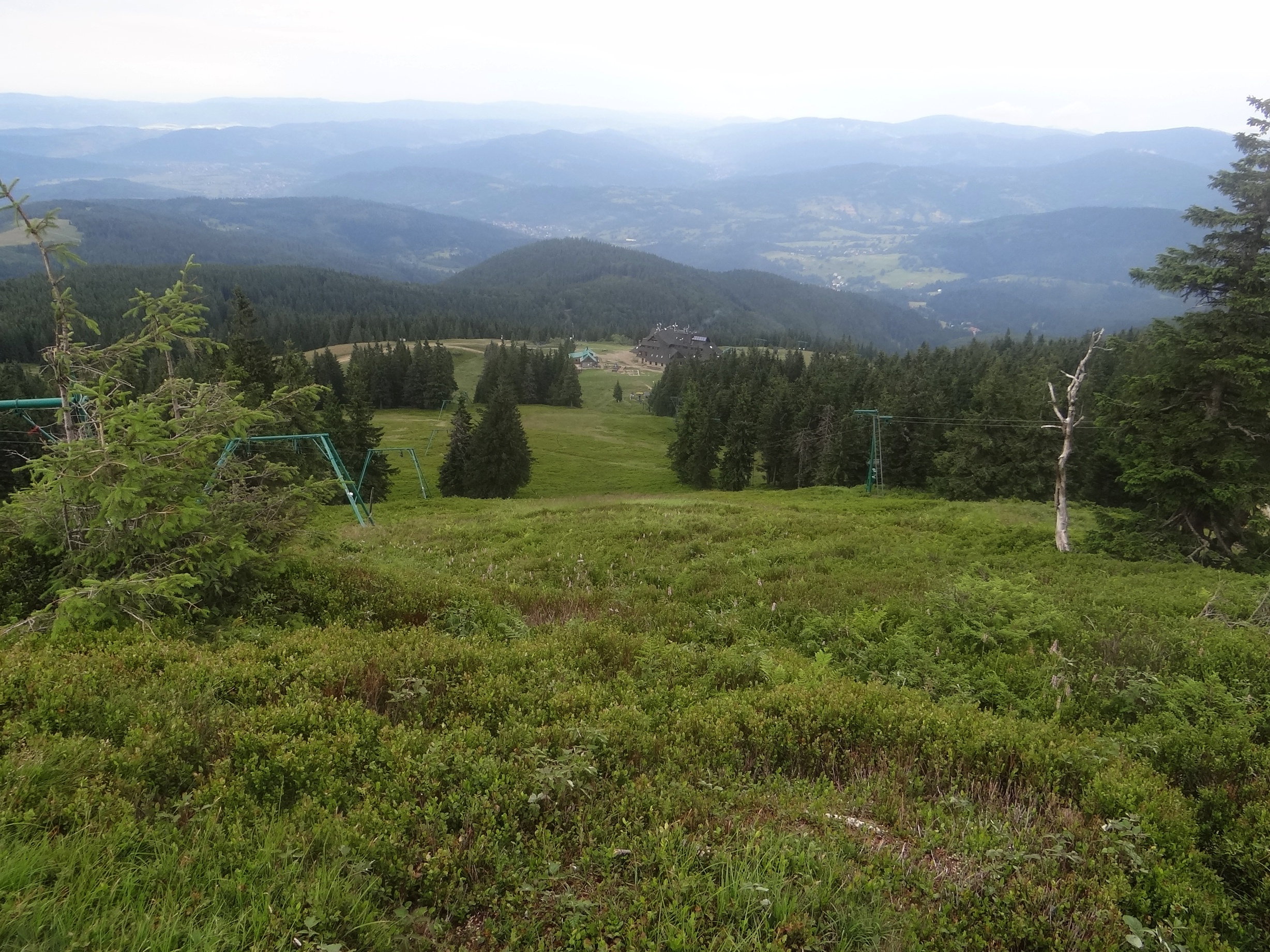 Hala Słowikowa. Widok na Halę Miziową i Korbielów